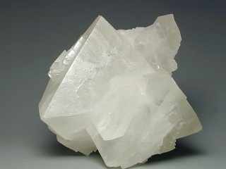 Kernit - Mineral aus der Mineralklasse der Borate, Chemismus Na2[B4O6(OH)2]·3 H2O - Ausgestellt im Mineralmuseum Montana, USA